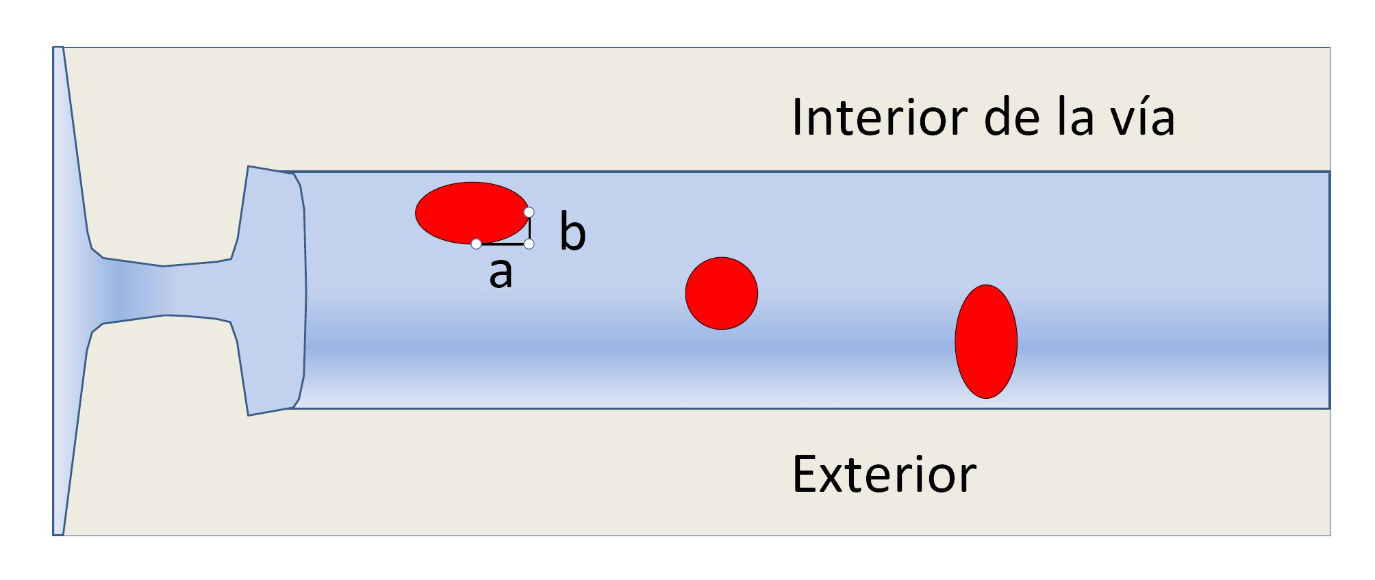 Elipse de contacto de Hertz, según la teoría de Esveld